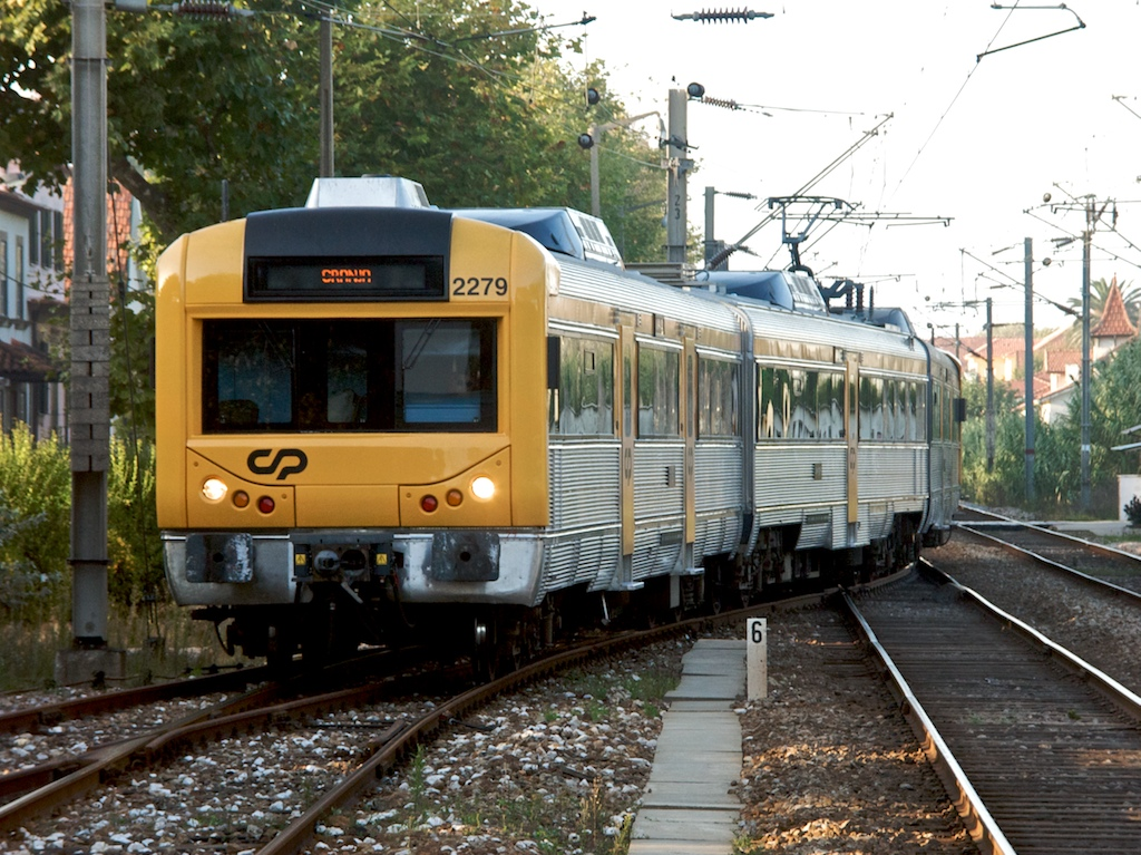 Tipo: Comboio Urbano 15980 [Porto • Campanhã - Granja] Local: Estação da Granja [Linha do Norte, PK 320] Data e hora: 15 de Outubro de 2008 [17h54] Material: Automotora 2279 [Unidade Tripla Eléctrica]